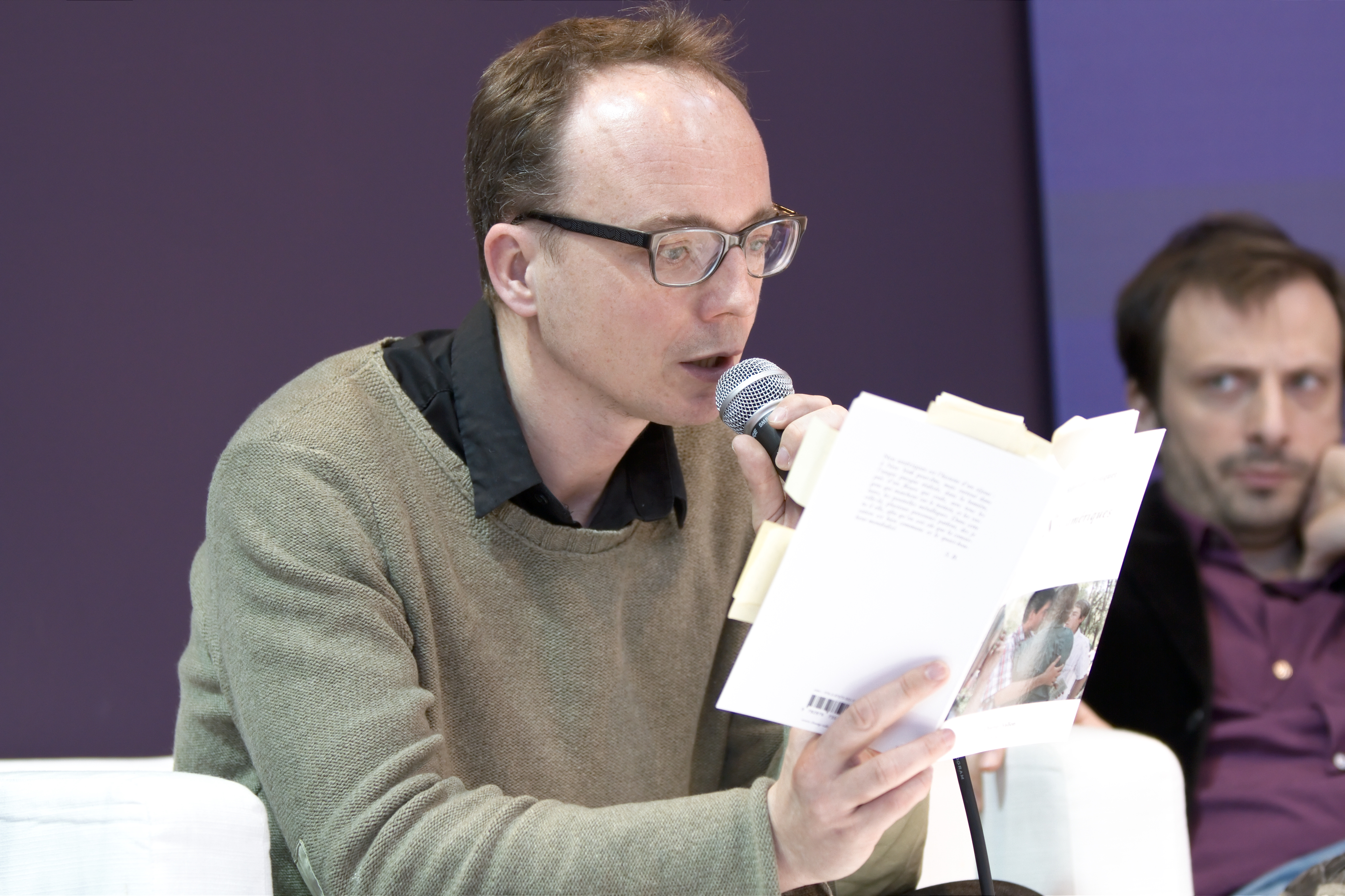 Stéphane Bouquet au Salon du livre de Paris lors d'une table ronde sur les Territoires littéraires : les Amériques.